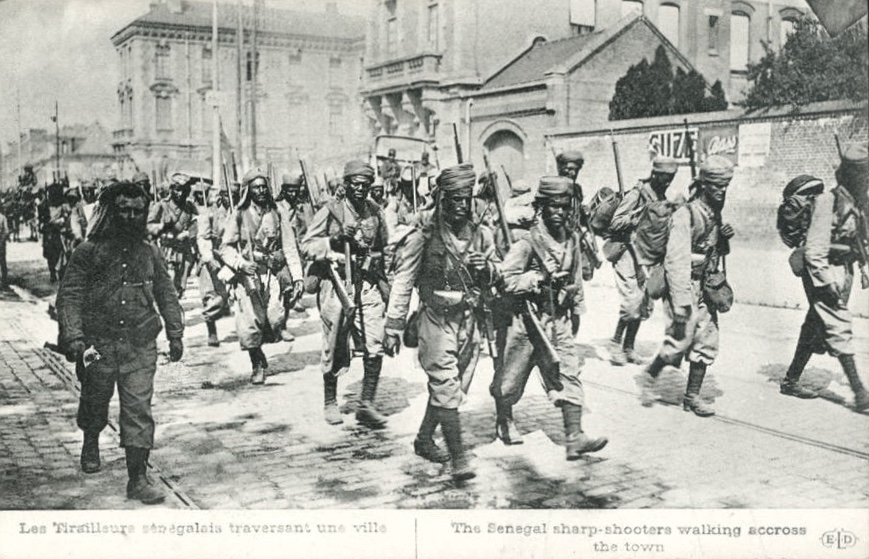 Tirailleurs sénégalais traversant une ville, 1914-1918